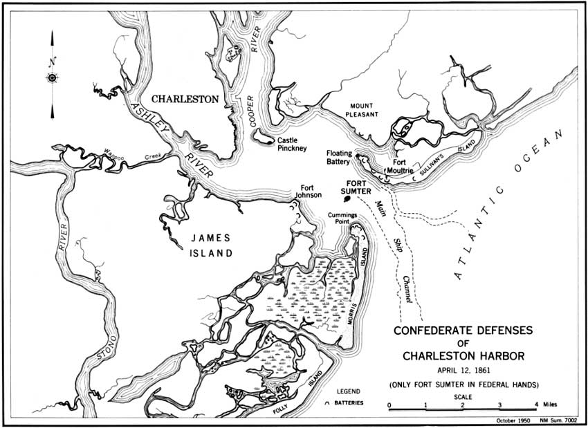 Carte présentant le port de Charleston, début de la guerre de Sécession.